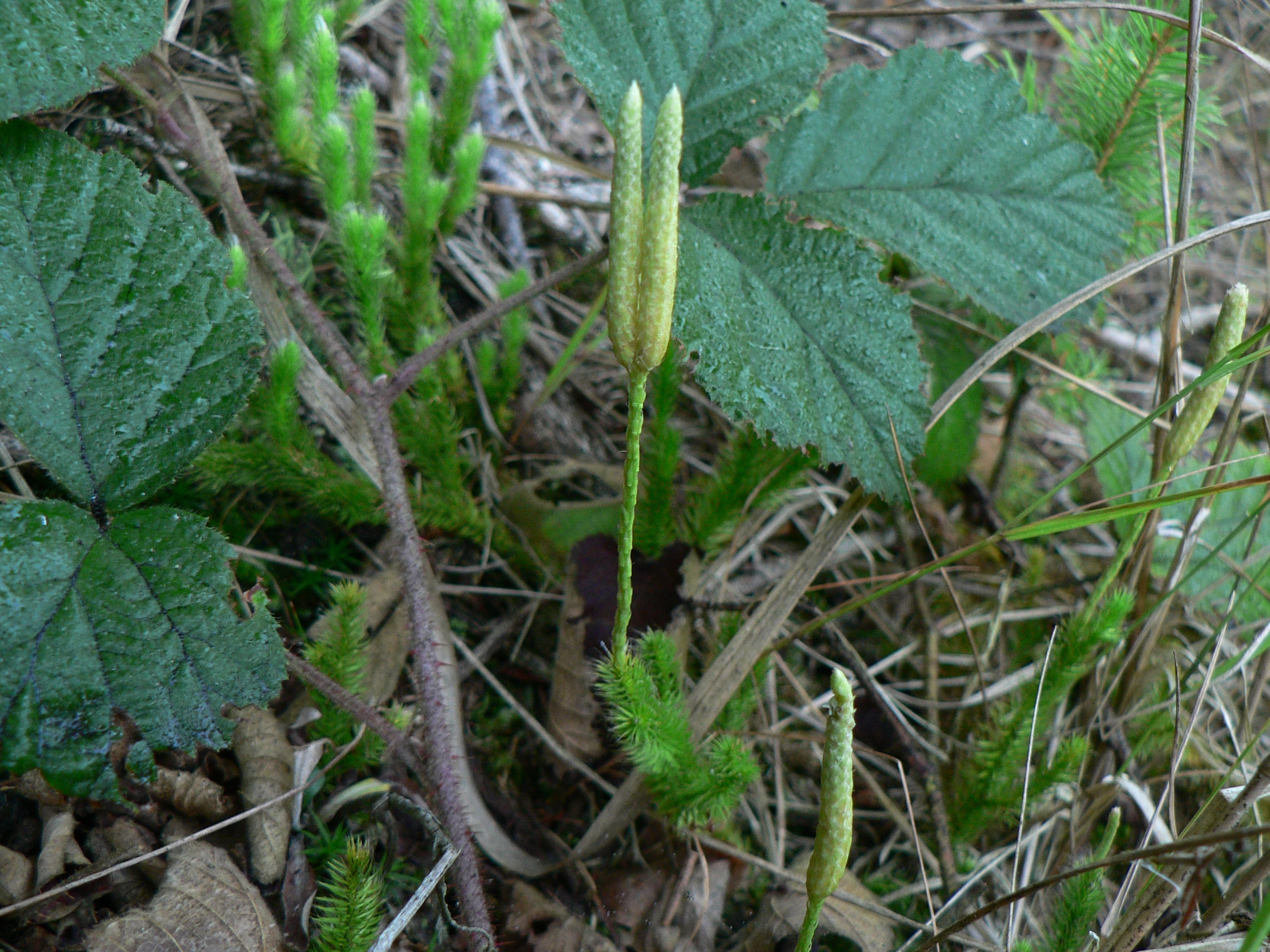 Plavuň vidlačka